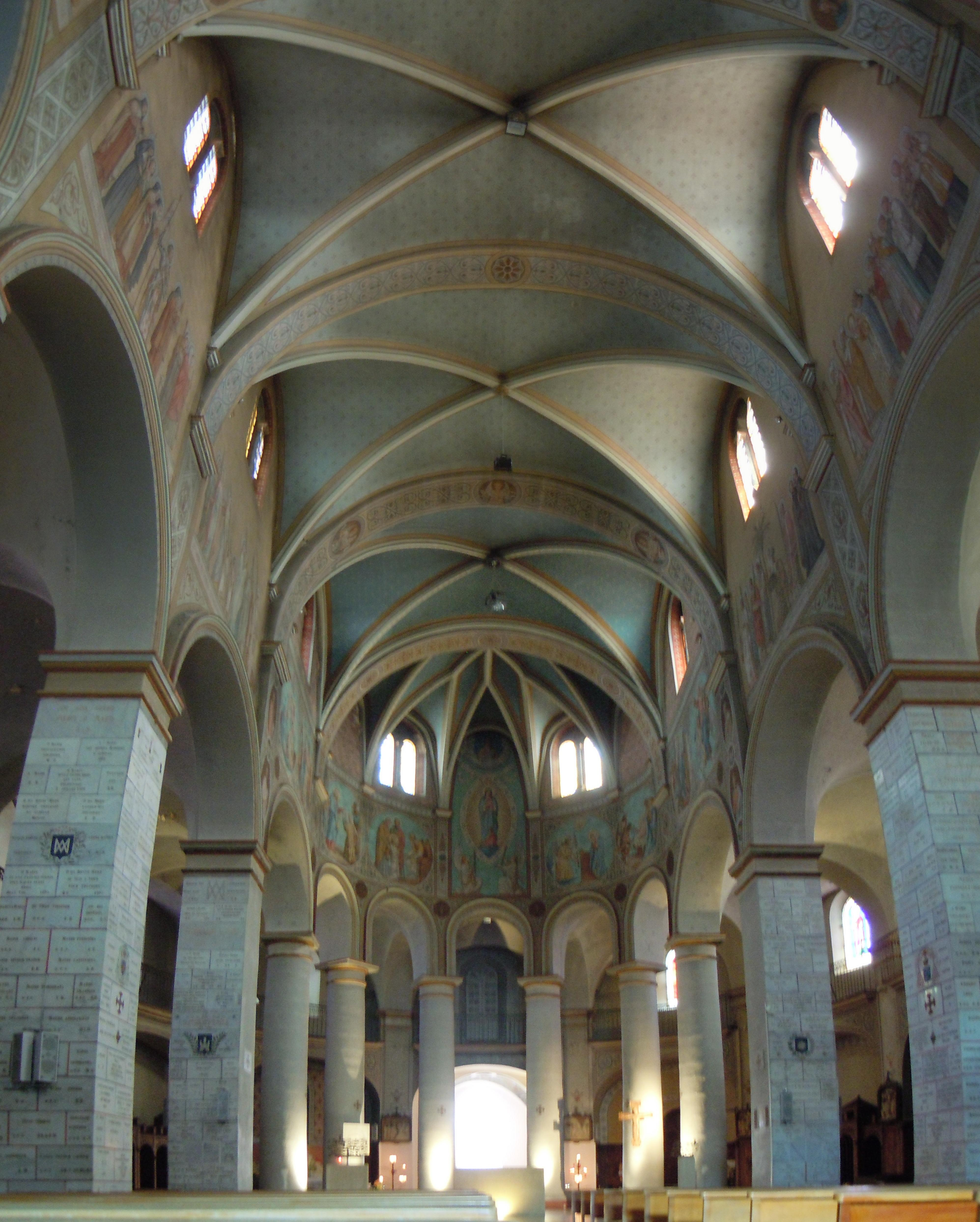 Basilique Notre-Dame de Bon Secours: nef - Lablachère - Ardèche - France